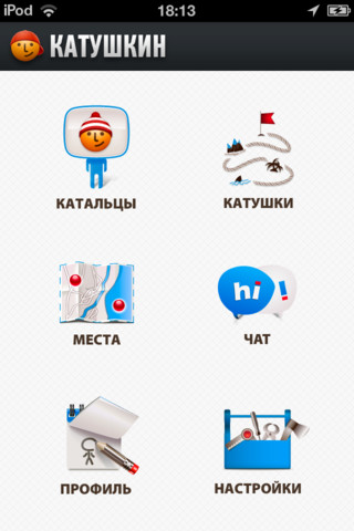 скриншот мобильного приложения «Катушкин»